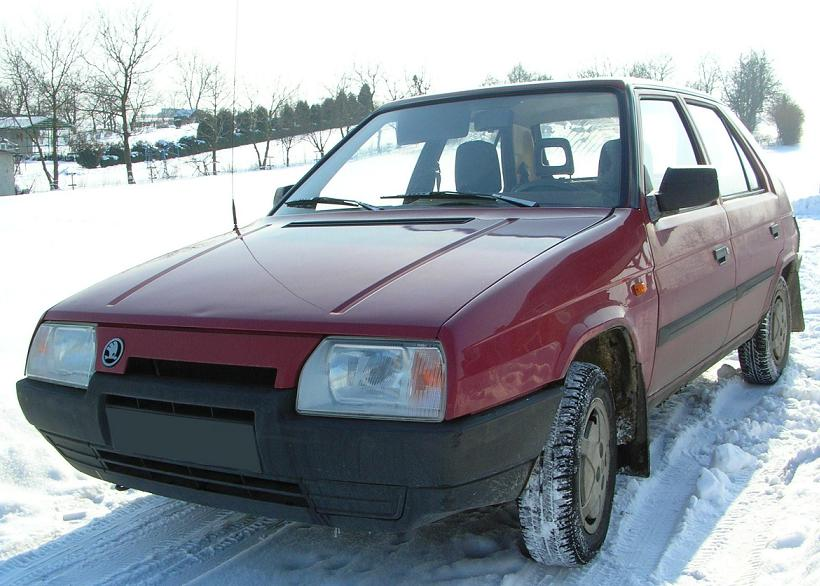 To jest Škoda Favorit 135 L (1991 - rok produkcji)